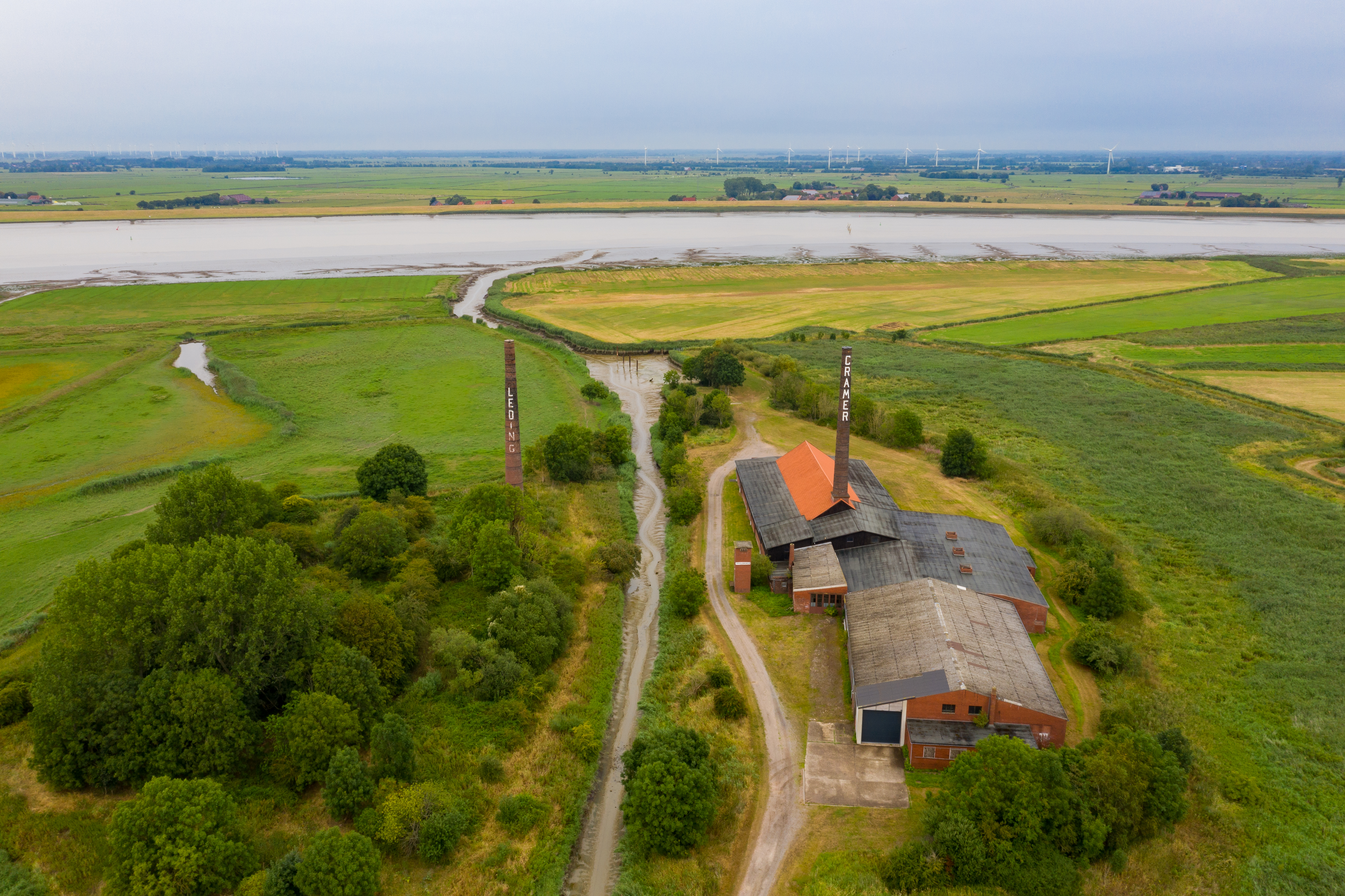 Die ehemaligen Ziegeleien Leiding und Cramer bei Midlum an der Ems